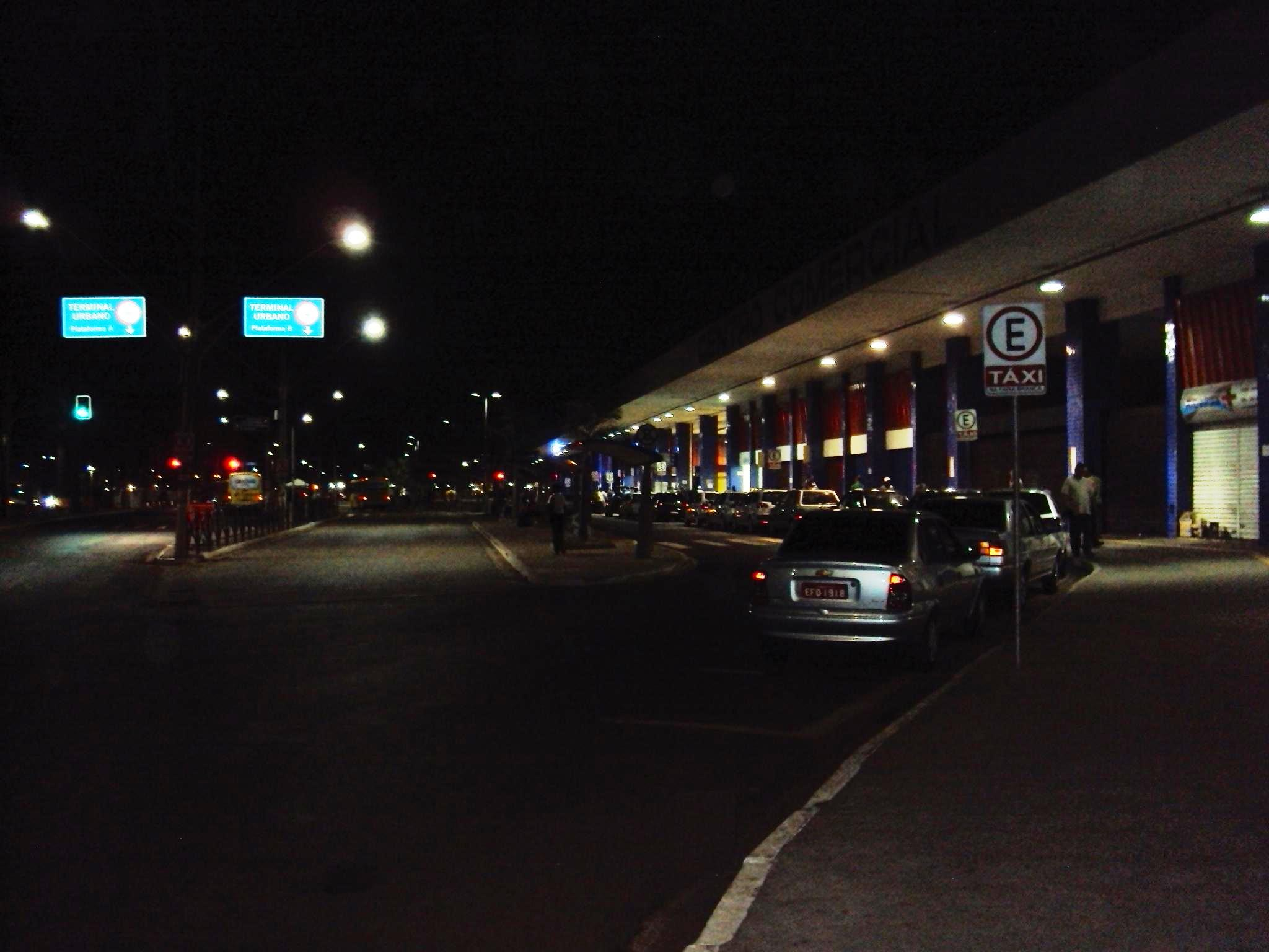 Terminal Rodoviário - Região Central